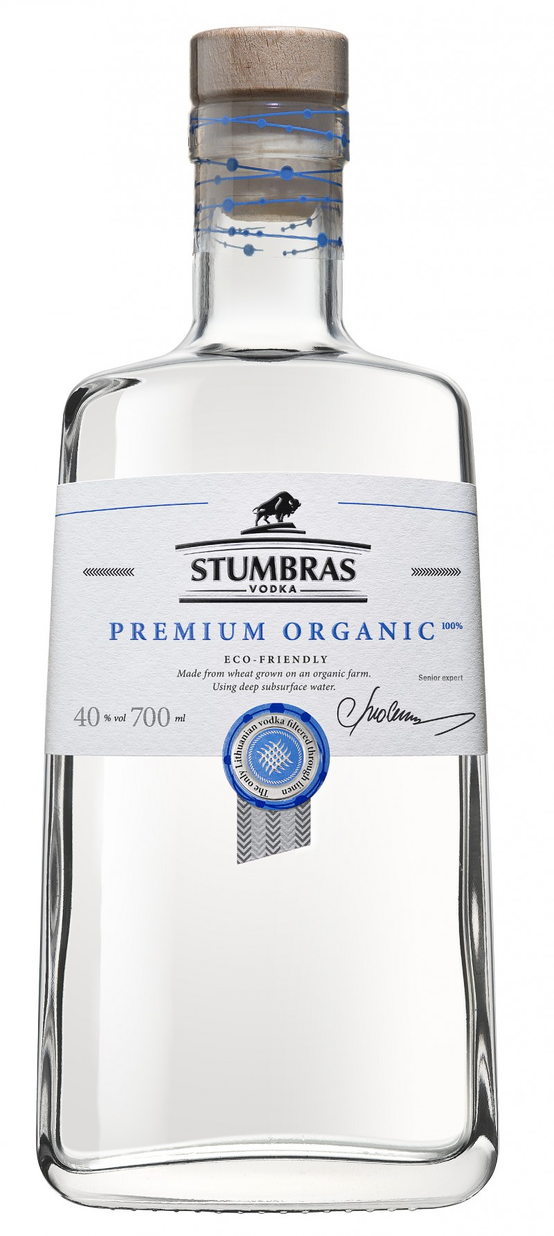 Degtinė Stumbras Premium Organic